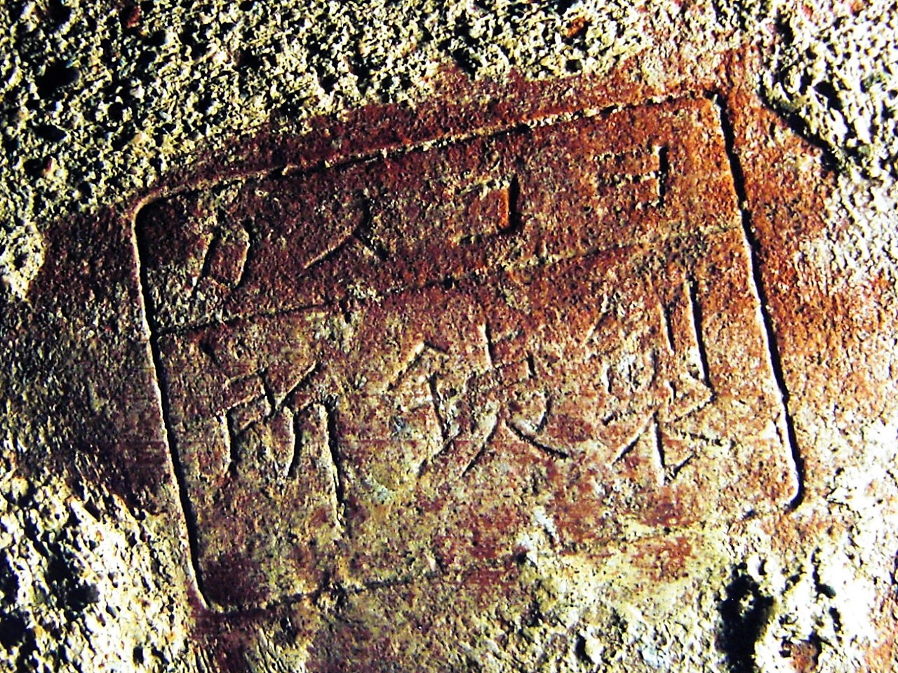 ヨコスカ製鉄所製煉瓦 野島埼灯台下にて出土